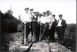 Topparoikka Niemen kartanon omistamalla Kuurilan metsäradalla vuonna 1934